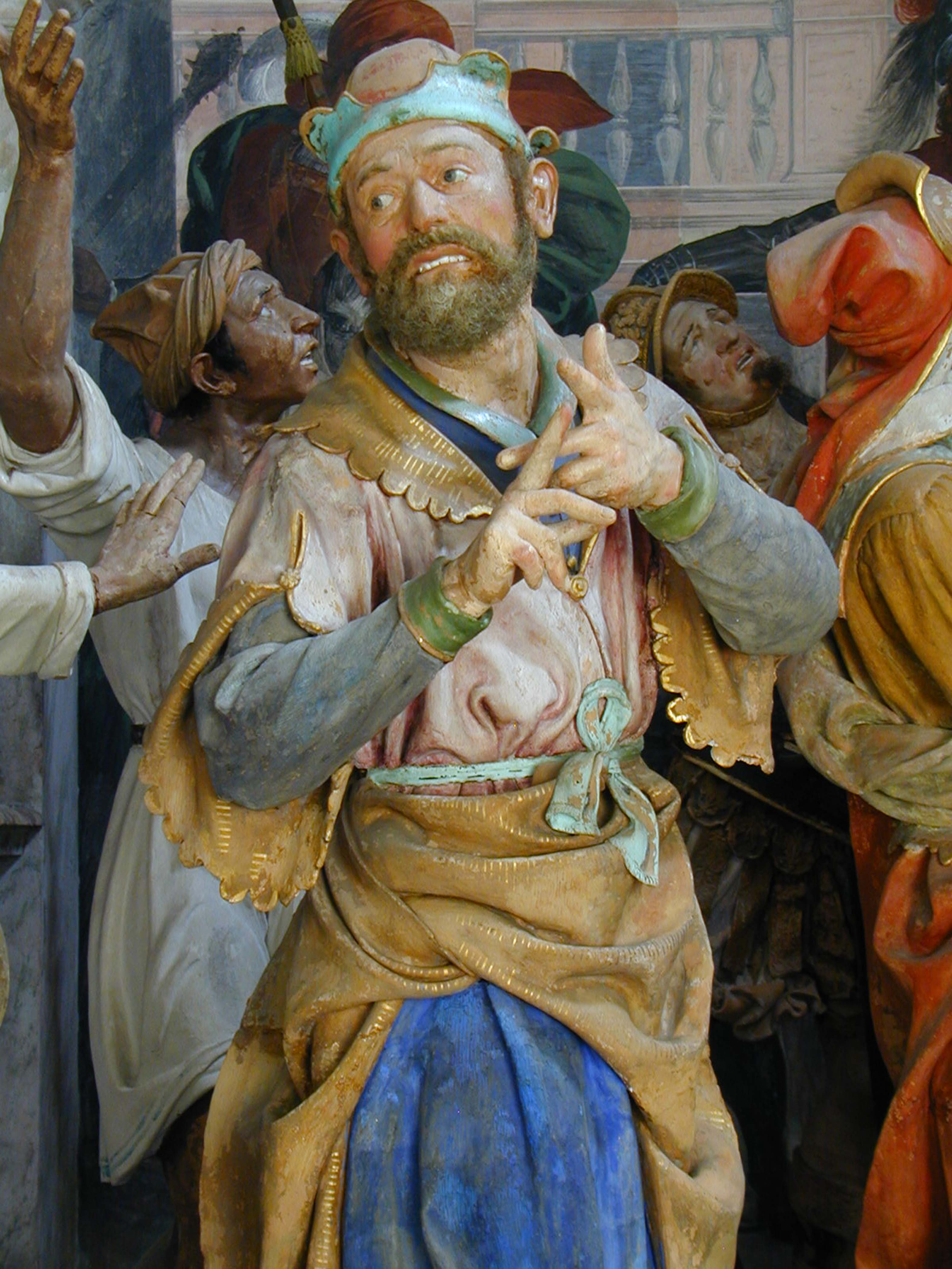 Sacro Monte di Varallo; Ecce Homo (detail of the crowd calling for crucifixion), statues by Giovanni d'Enrico, 1608-9, Chapel XXXIII